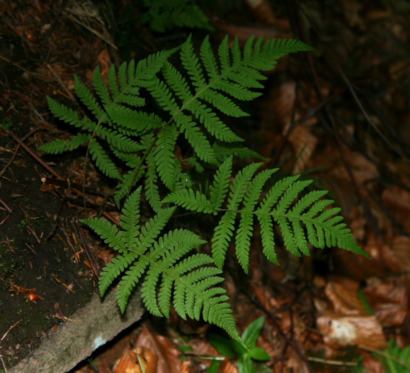 Buchenfarn (Phegopteris connectilis), Sumpffarngewächse (Thelypteridaceae) - Österreich/Austria/Autriche: Oberösterreich, Hausruckviertel, ca. 2.2 km NE Forsthaus Redltal, ca. 680 m s.m.